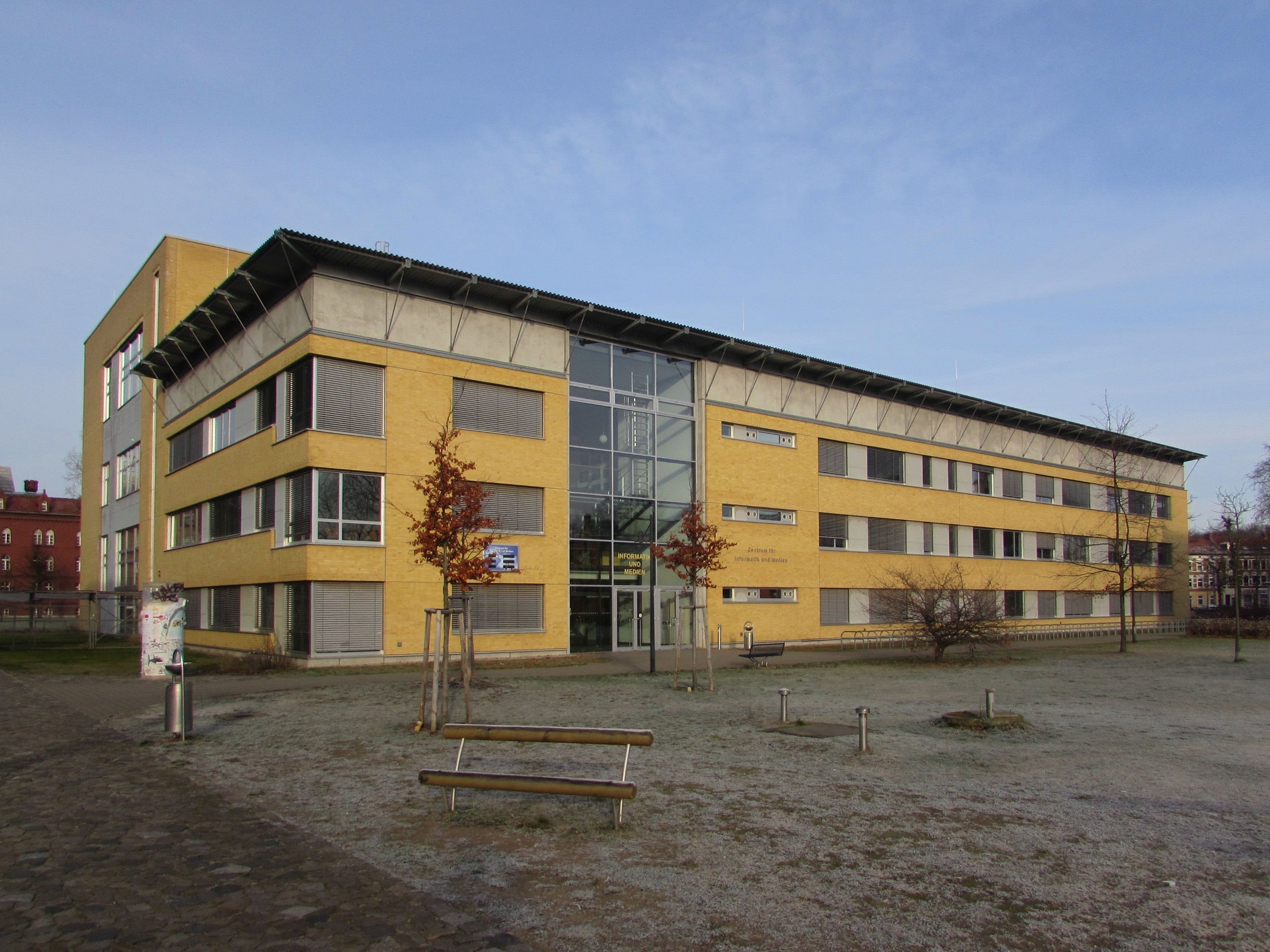 fh brandenburg fachbereich informatik, medien